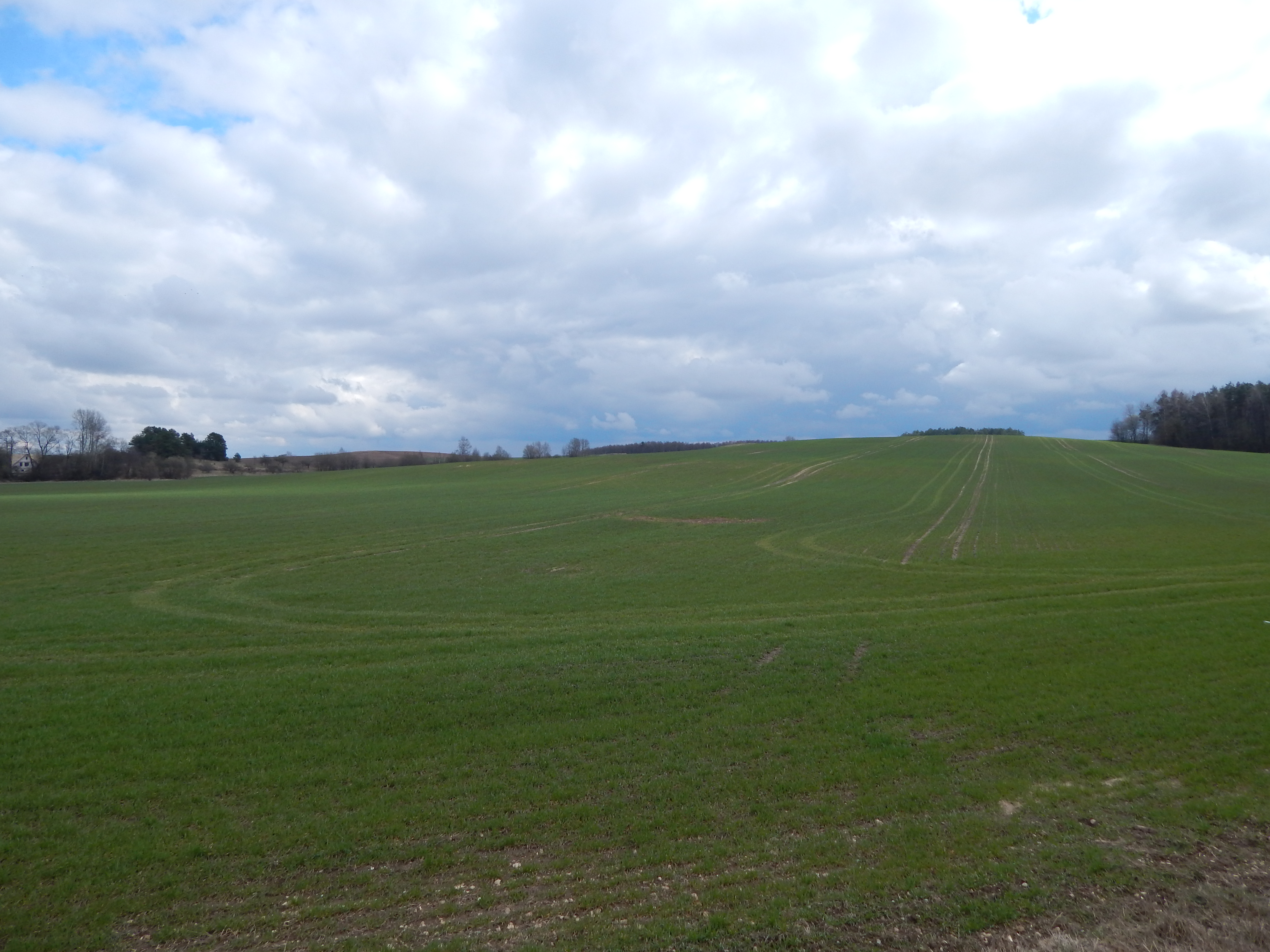 Фартыфікацыйныя збудаванні Гродзенскай крэпасці:земляны форт № 1земляны форт № 5земляны форт № 6форт № 1рэшткі форта № 1а (малы форт)сховішча апорнага пункта форта № 1арэшткі форта № 2рэшткі форта № 2а (малы форт)рэшткі сховішча апорнага пункта форта № 2арэшткі парахавога склепарэшткі форта № 3рэшткі форта № 3а (малы форт)рэшткі форта № 3а (парахавы склеп)форт № 3а (пазіцыя для 210-мм японскіх гармат)рэшткі форта № 3бфорт № 4форт № 4а (малы форт)парахавы склепфорт № 5форт № 5апарахавы склепрэшткі форта № 6два горжавыя бліндажы фортавай групы № 6тры сховішчы фортавай групы № 6рэшткі форта № 7парахавы склеп фортавай групы № 7_412Д000677 This is a photo of Belarusian heritage monument. Reference number: 412Д000677 ( WLM)